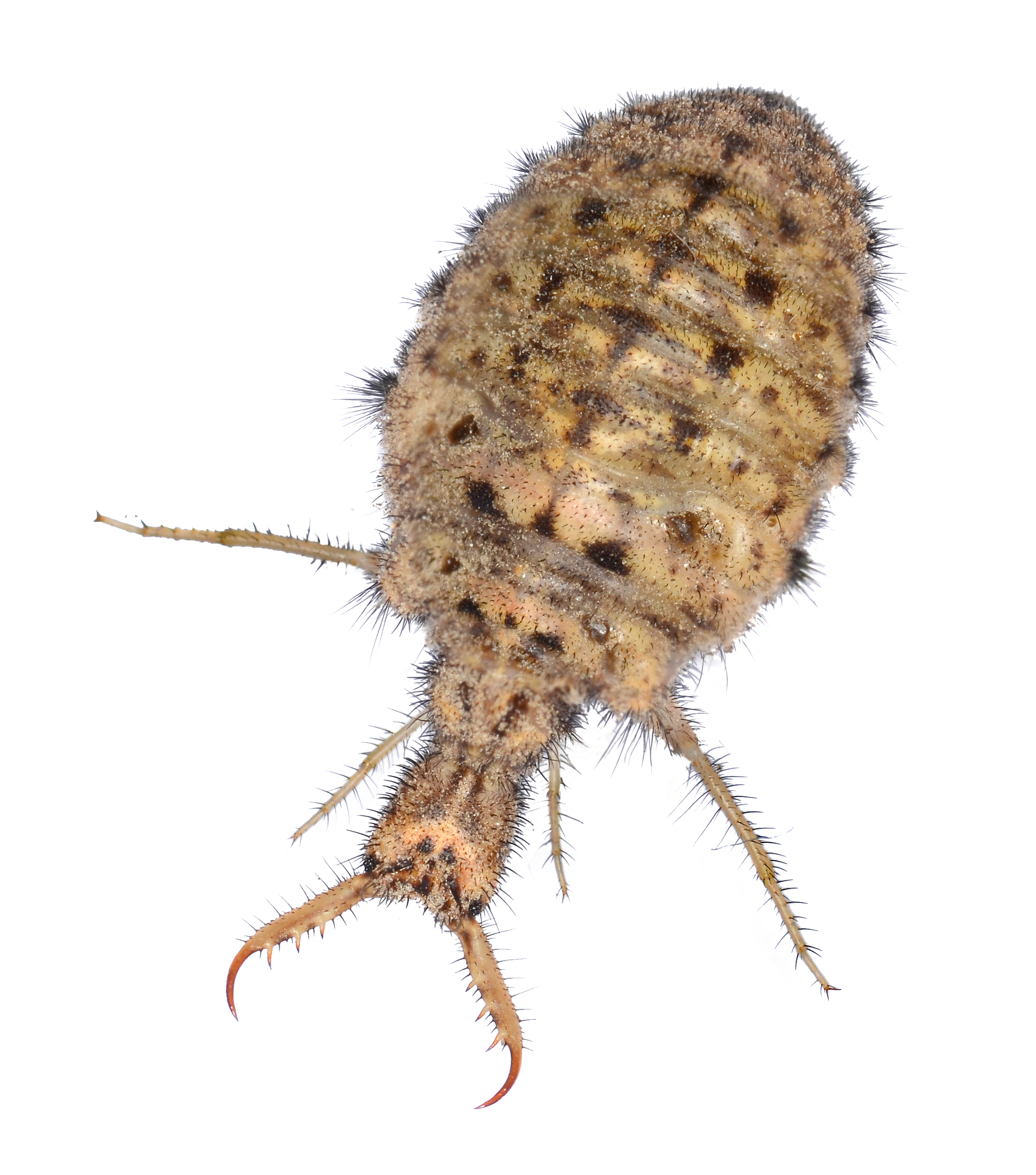 Ein Ameisenlöwe